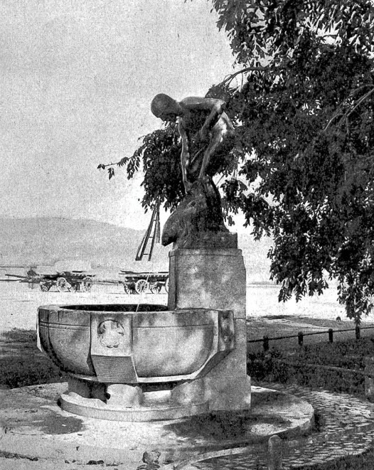 Brunnenskulptur 1909, Zürich am Mythenquai, Zürichsee. Von Valentin Walter Mettler (1868–1942) Bildhauer